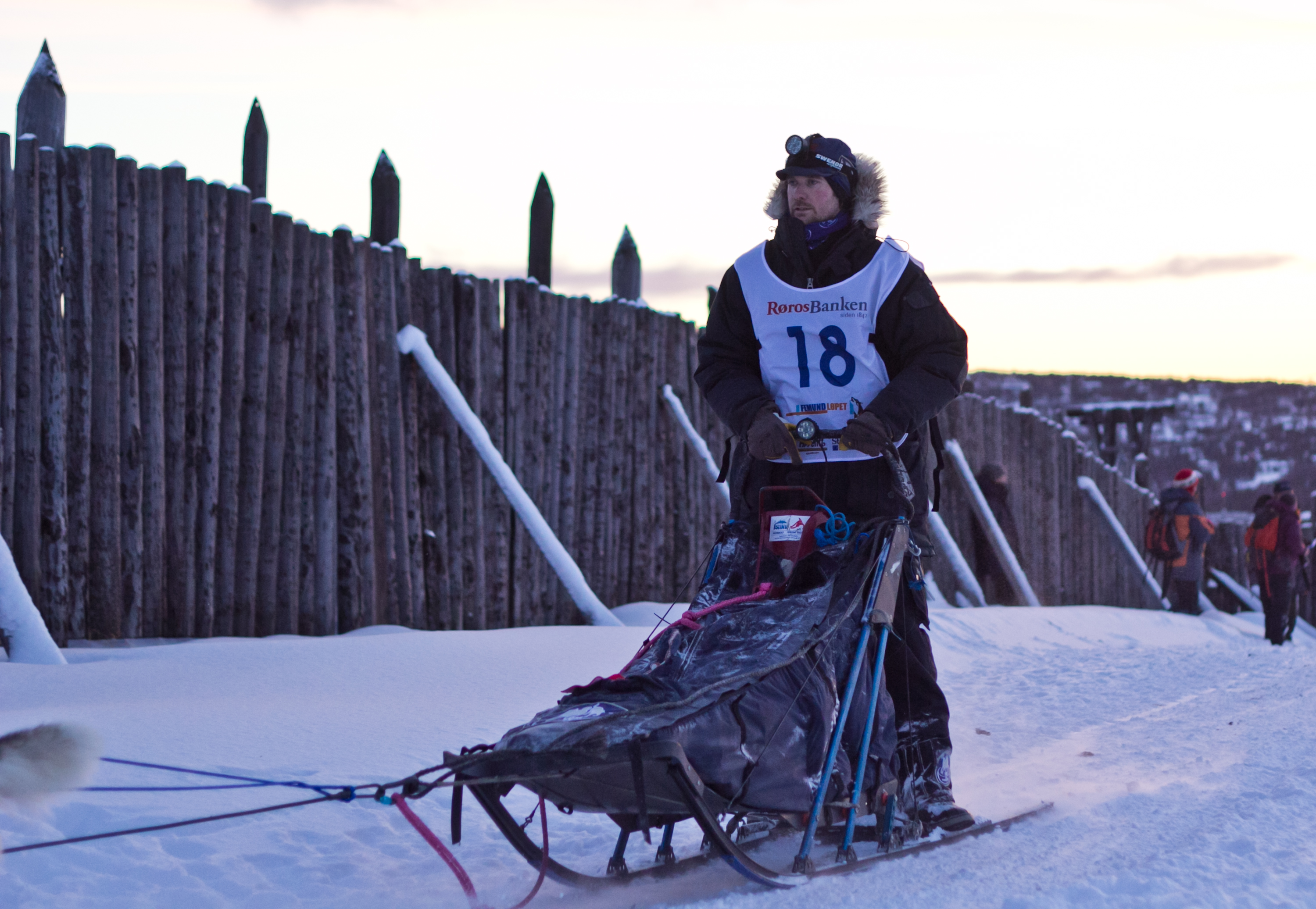 Hanne Nordskag